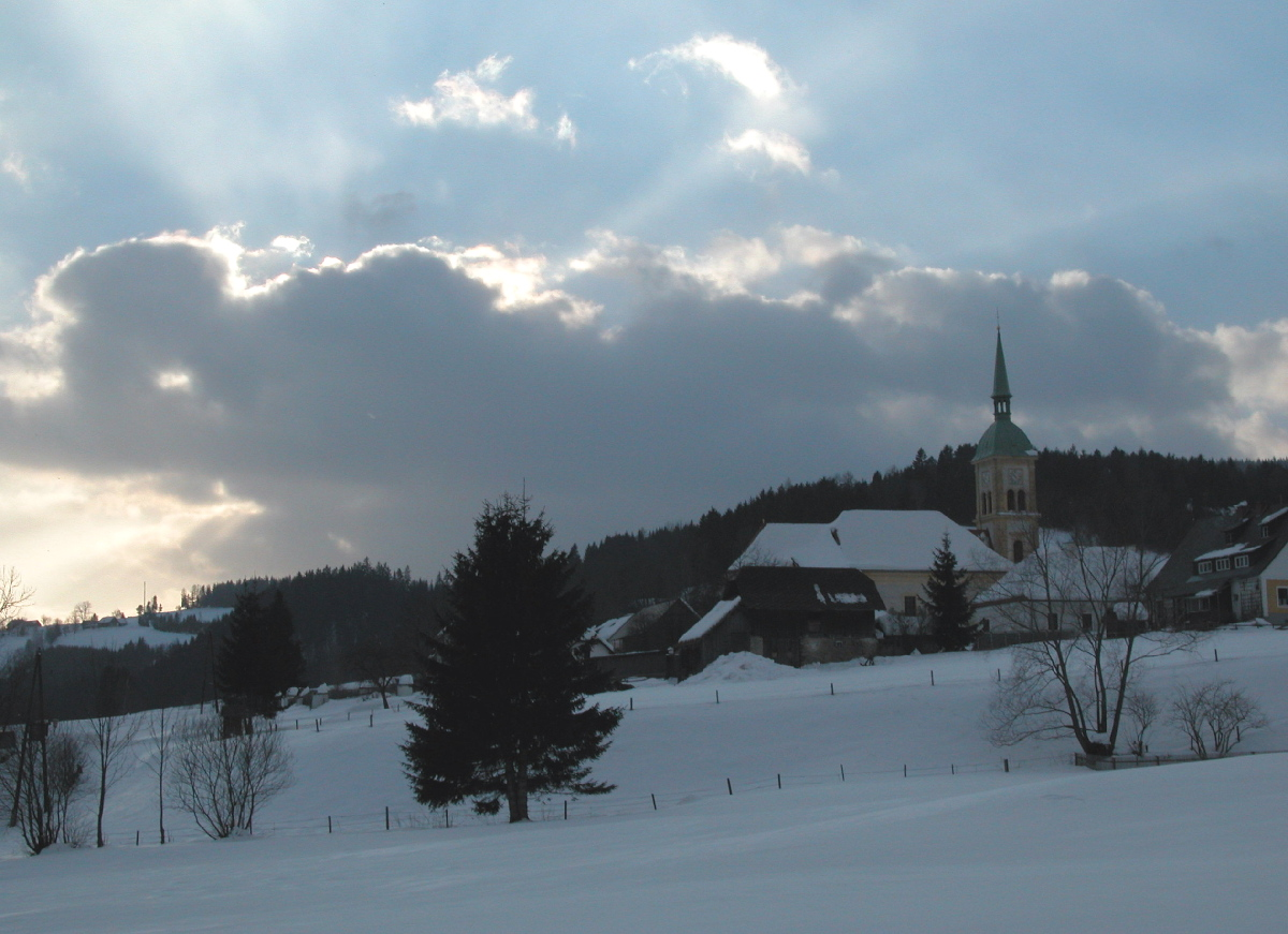 Rettenegg, Steiermark/Styria